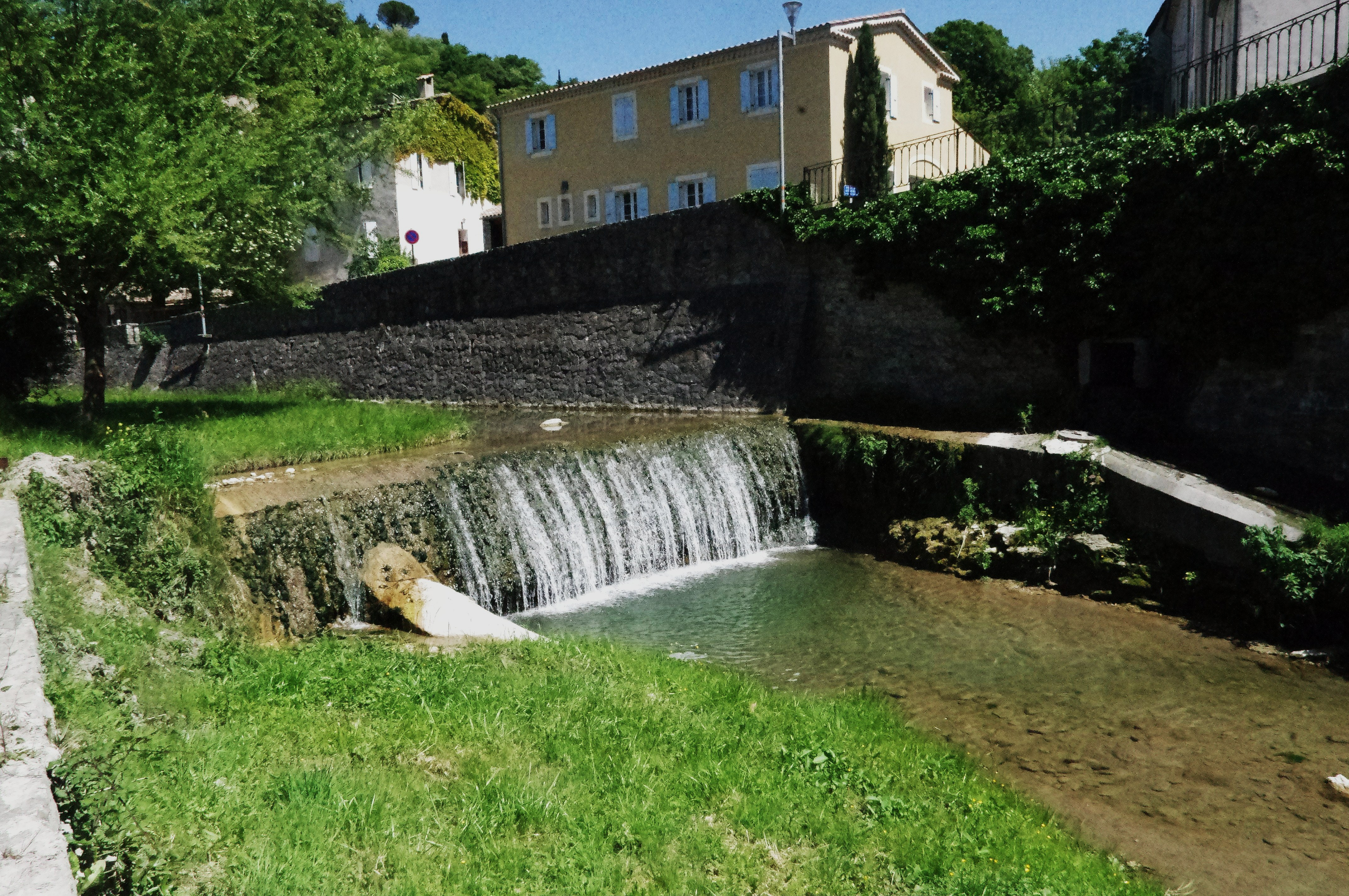 cours d'eau à Dieulefit, en Drôme provençale